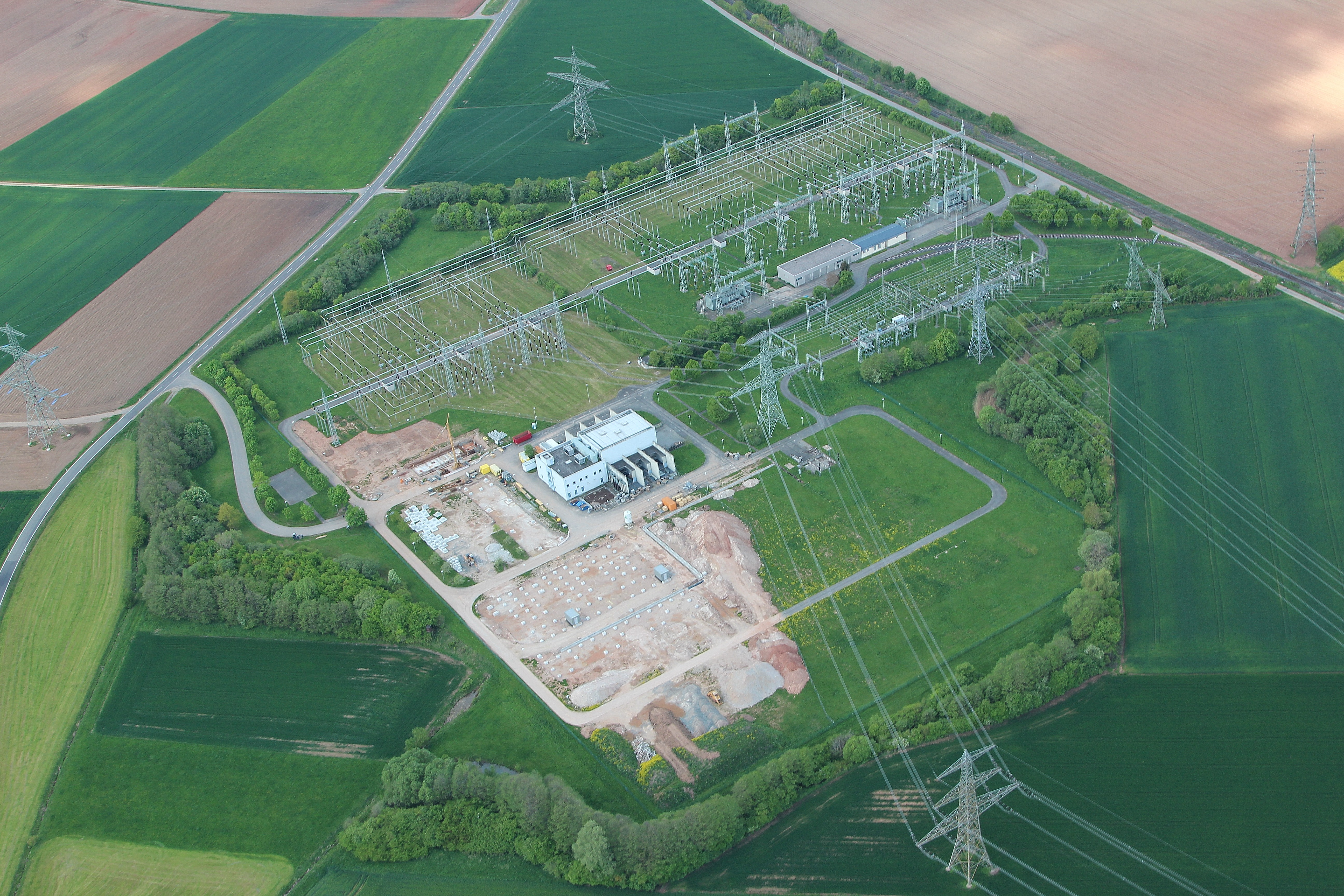 Umspannwerk Etzenricht, Landkreis Neustadt an der Waldnaab, Oberpfalz, Bayern